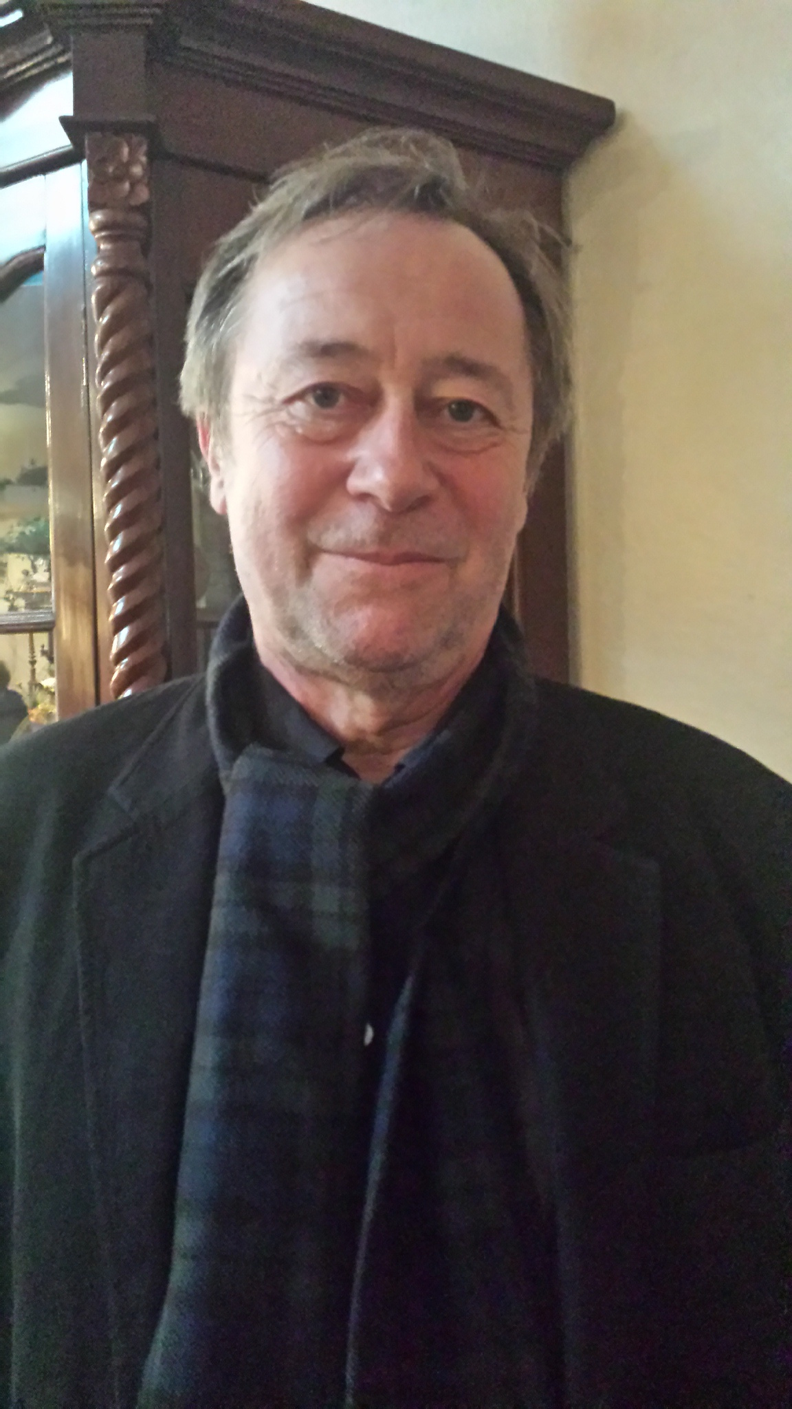 Porträt des ostfriesischen Kunstmalers Herber Müller